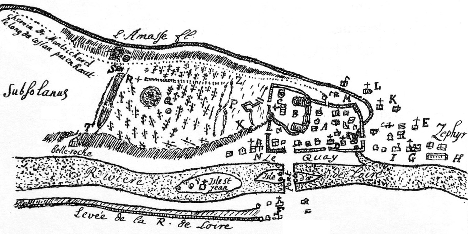 Kartenähnliche Zeichnung der Stadt Amboise und des Châtelliers-Felsens (Norden am unteren Bildrand)